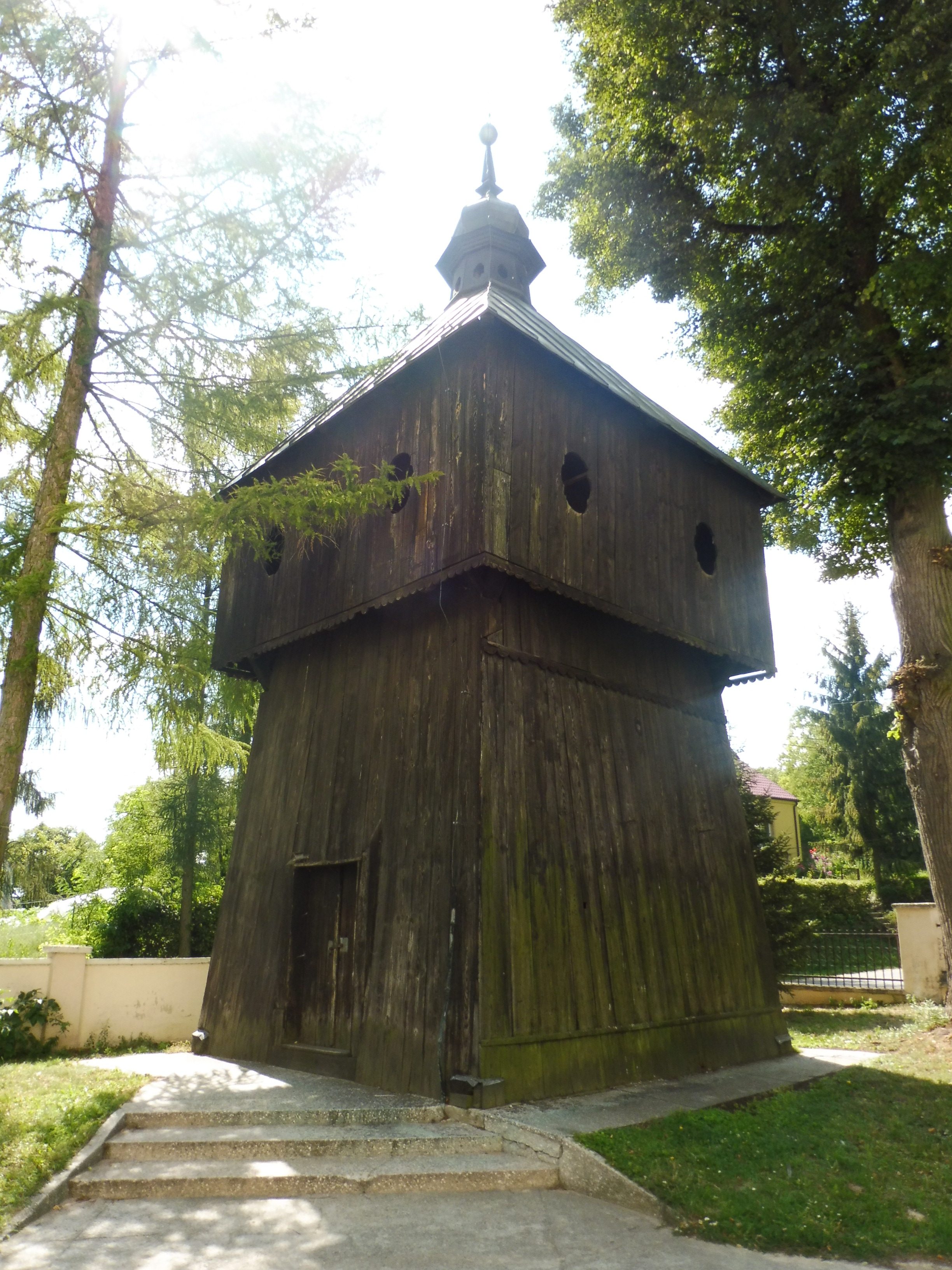 Wrocimowice - dzwonnica w zespole kościoła parafialnego pw. św. Andrzeja, kon. XVIII